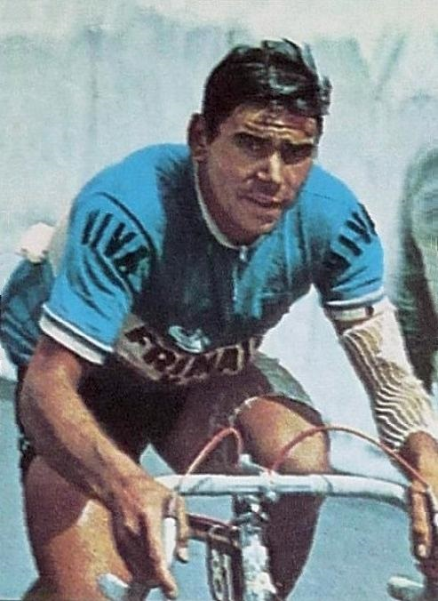 Joaquim agostinho (1971), 'Sprint 71', Panini figurina n°180.